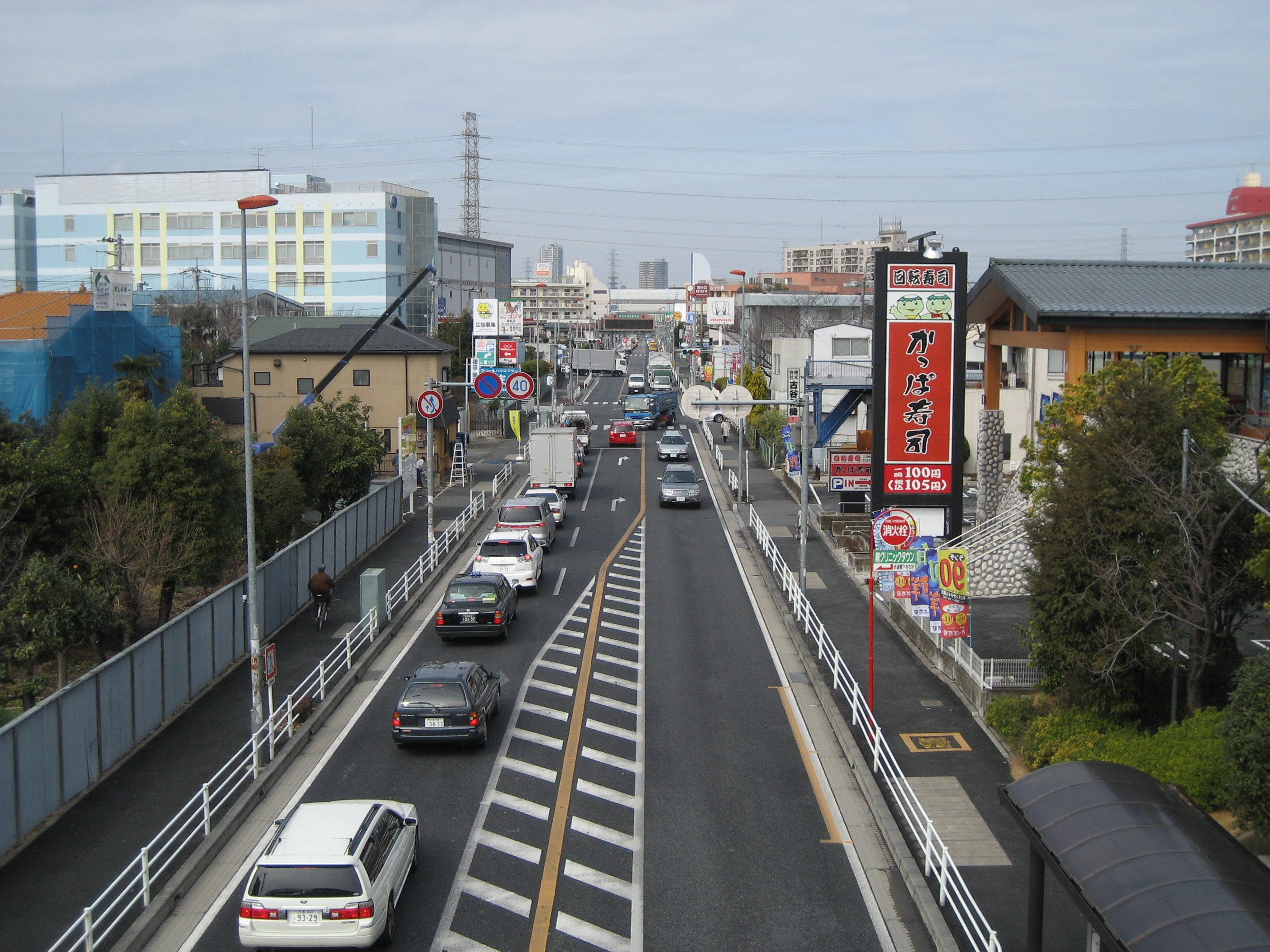 国道17号線蕨市内